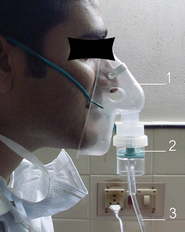 ശ്വസനസഹായി ഉപകരണം. അടയാളപ്പെടുത്തിയ ഭാഗങ്ങൾ - 1.മുഖത്ത് വയ്ക്കുന്ന മാസ്ക് 2.മരുന്നു ലായനി നിറയ്ക്കുന്ന കപ്പ് 3.നെബുലൈസറിലൂടെ വായു എത്തുന്ന ട്യുബ്